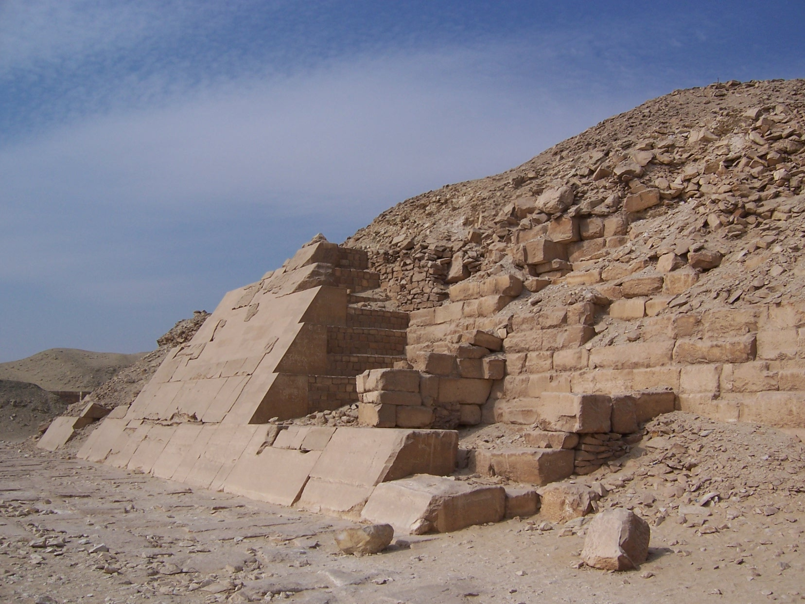 Pictures from Saqqara, Egypt